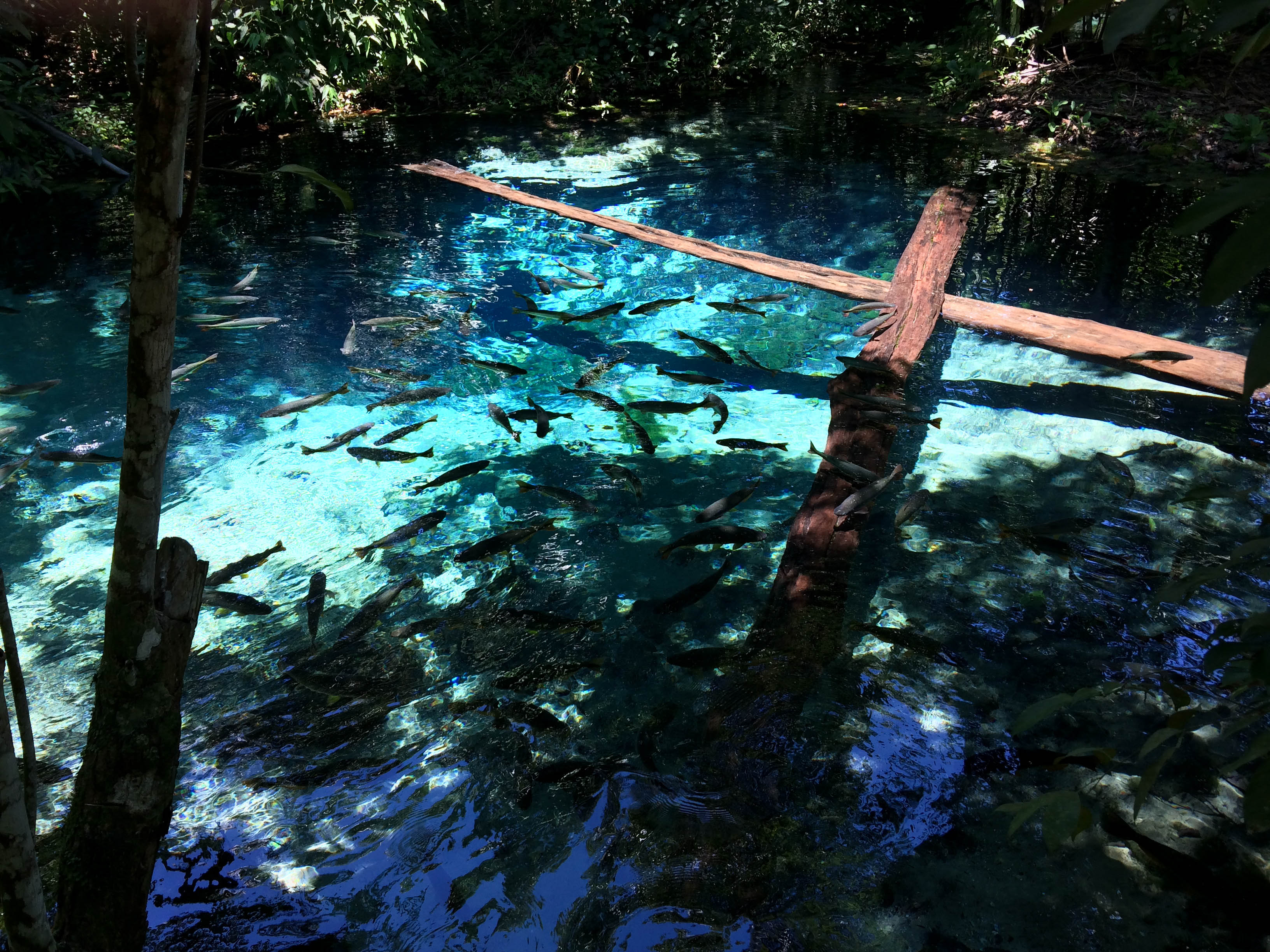 PEIXES AQUÁRIO ENCANTADO NOBRES